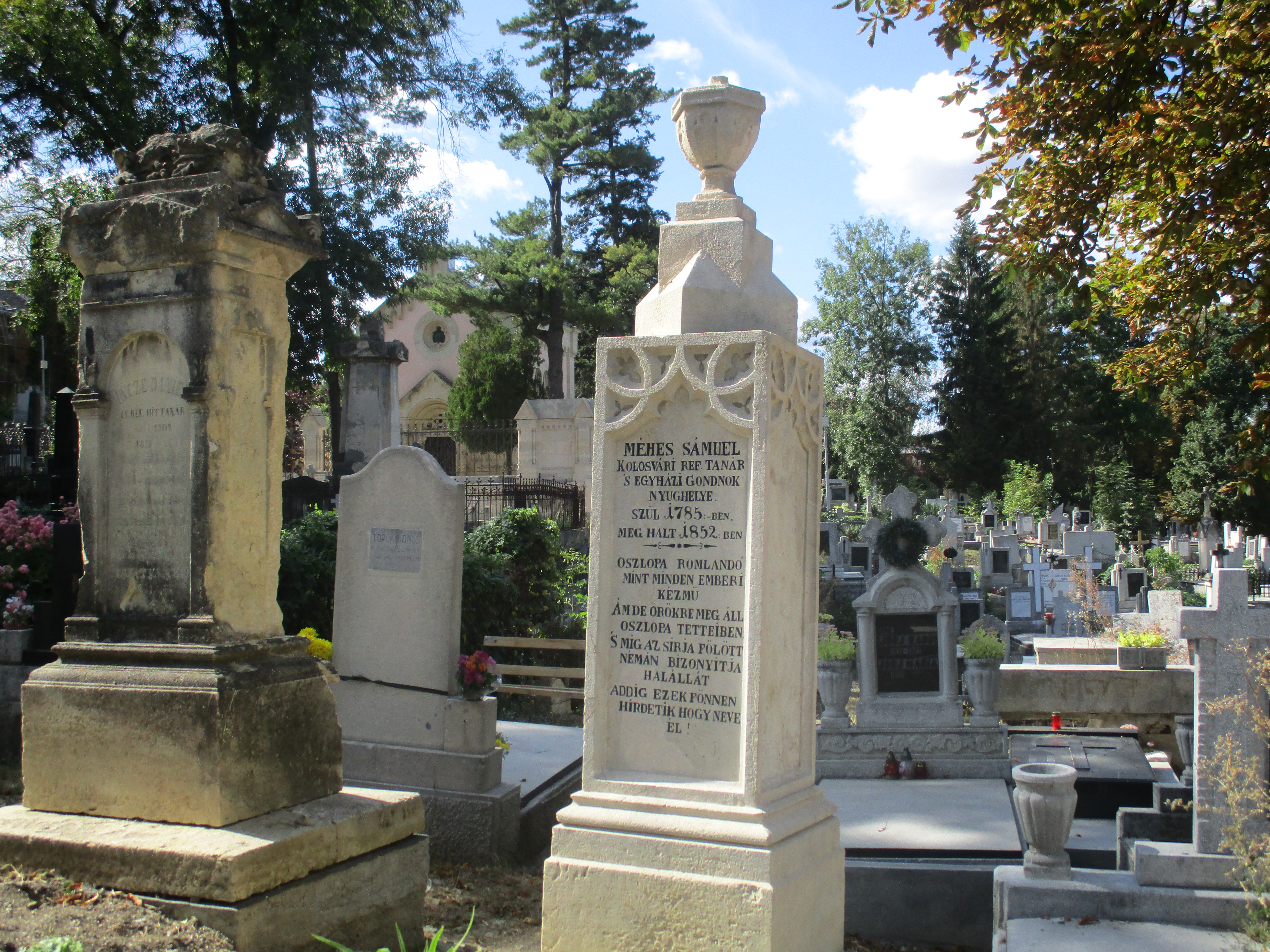 Obelisc funerar Méhes Sámuel (1785-1852) profesor reformat